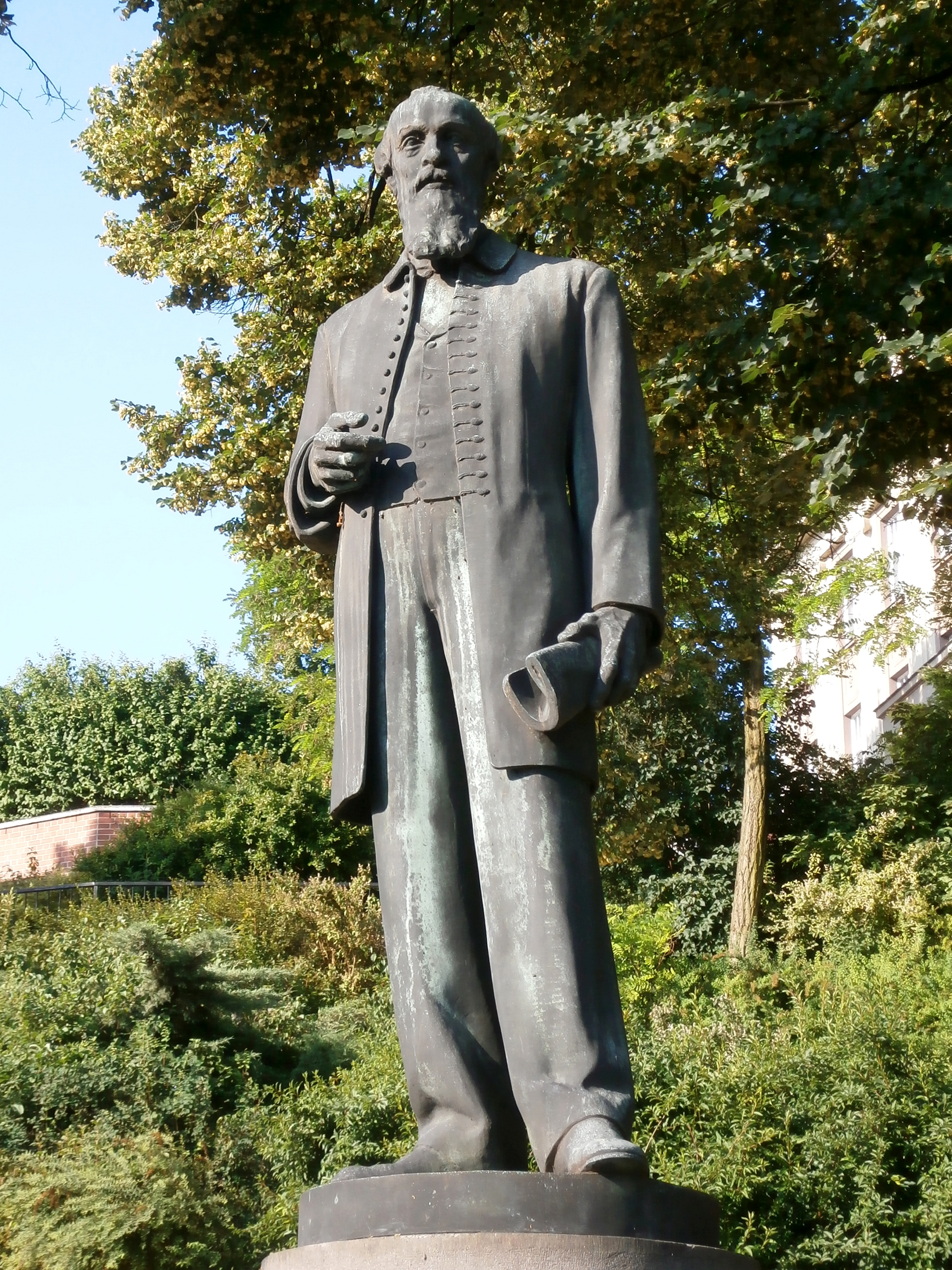 Pomník L. J. Pospíšila (Hradec Králové)